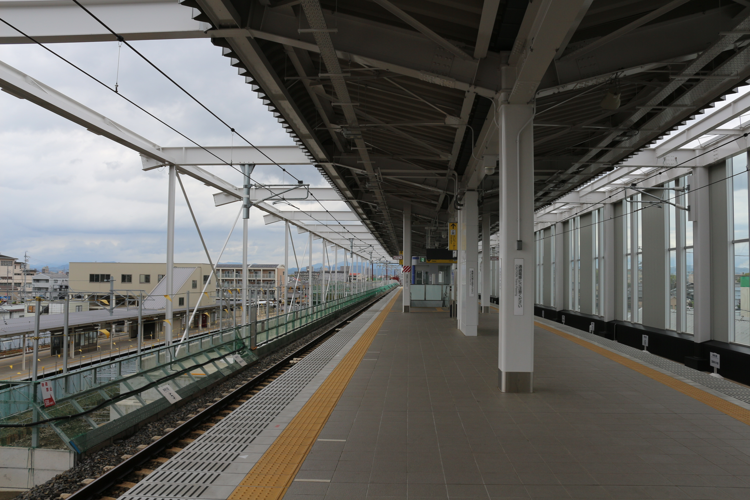 布袋駅ホーム